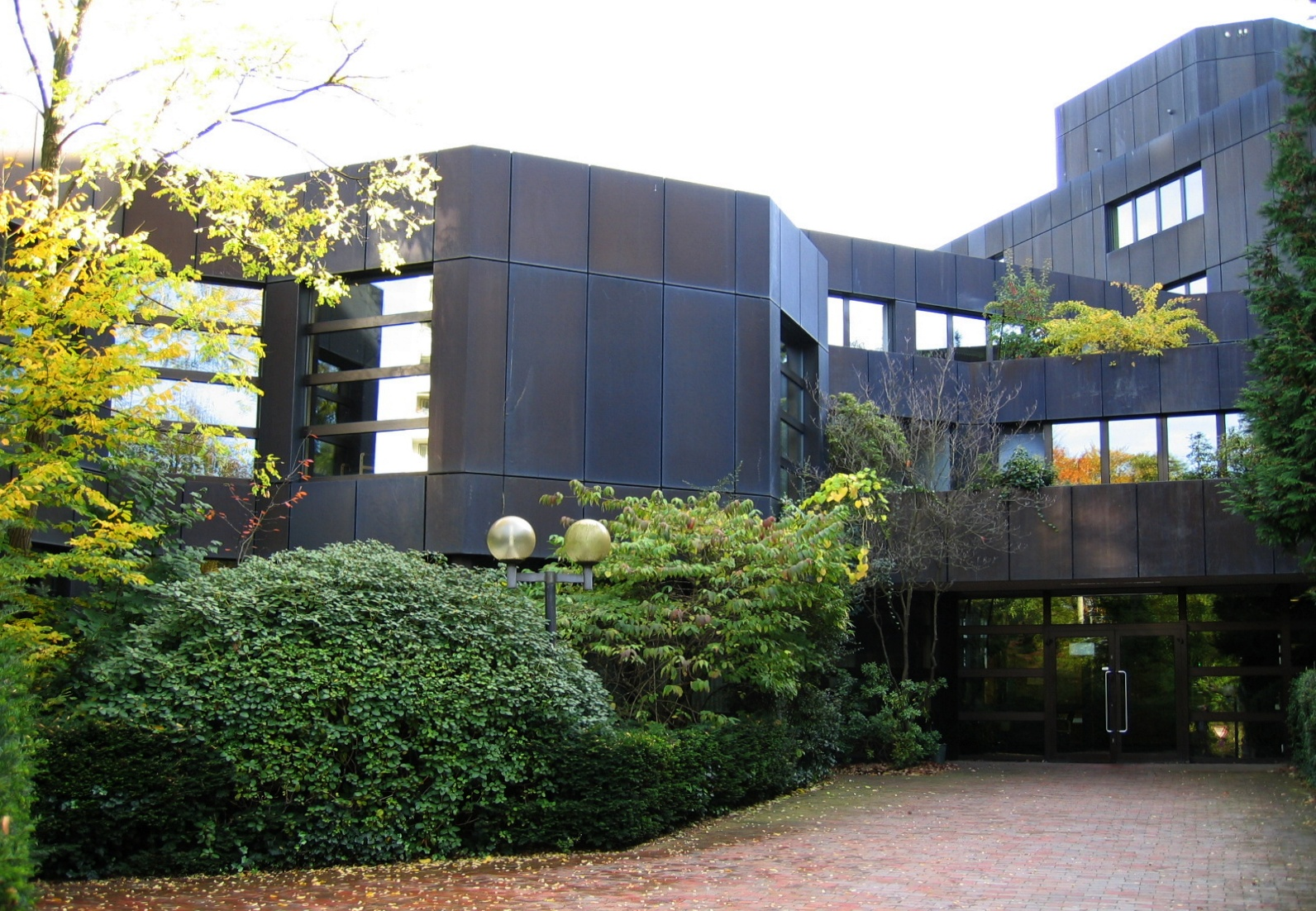 Description: Amtsgericht Iserlohn, Friedrichstraße 108/110 in Iserlohn Source: selbst fotografiert Date: 27. Okt. 2005 Author: Bubo